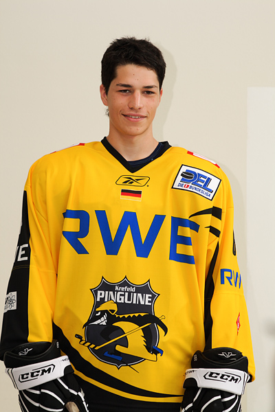 Sinan Akdag im Dress der Krefeld Pinguine 2008/2009